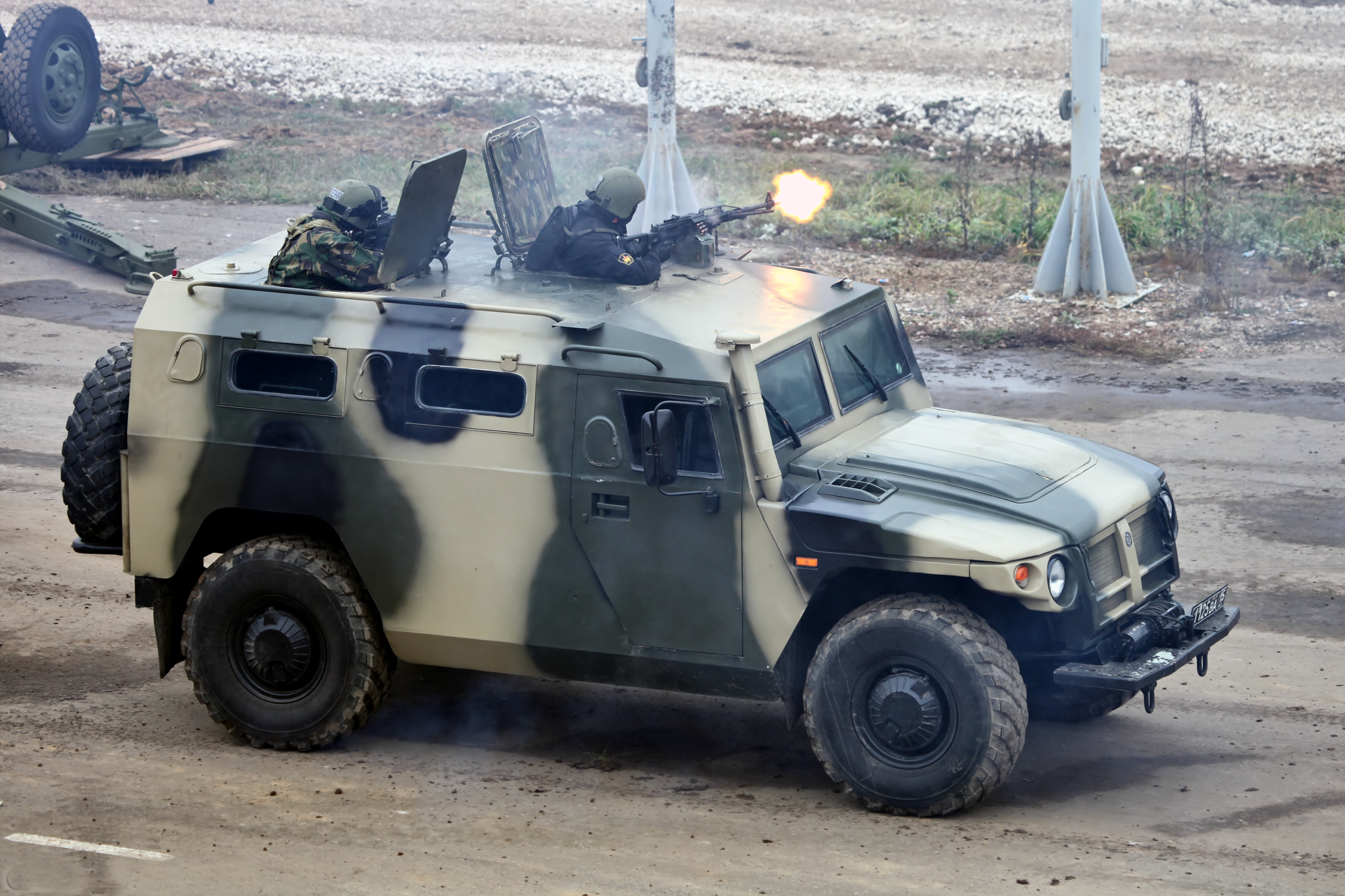 показуха 604 ЦСН ВВ МВД России Витязь (604th Special purpose center Vityaz of Internal troops show)